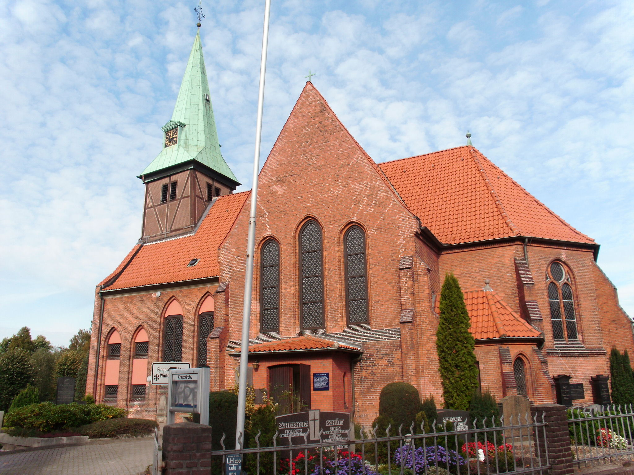 Die Kreuzkirche der evangelisch-lutherischen Kirchengemeinde Kirchdorf in Hamburg-Kirchdorf.This is a photograph of an architectural monument.